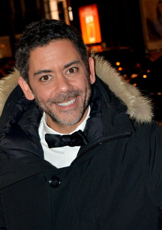 Manu Payet à la cérémonie des César du cinéma